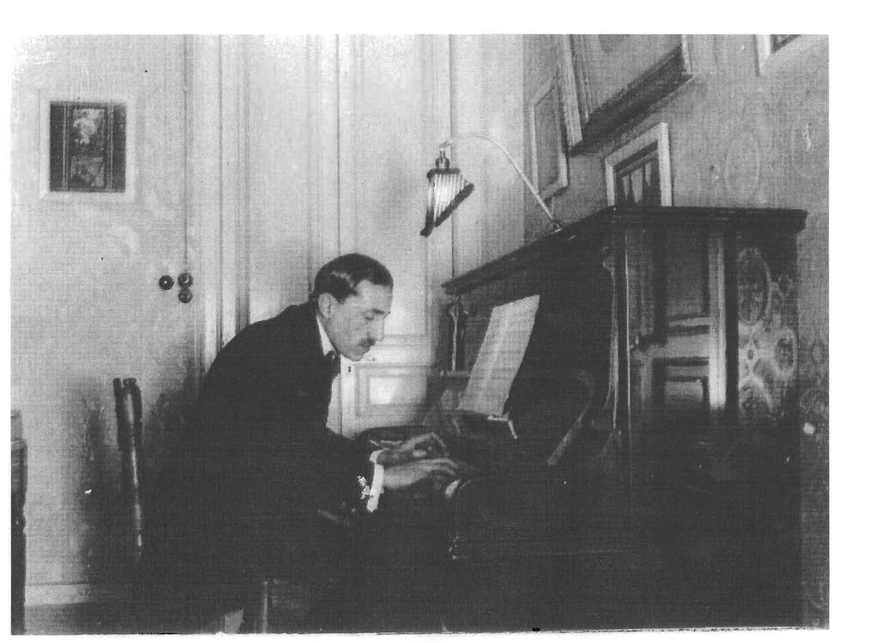 Josep Martí i Cristià (1884-1918)